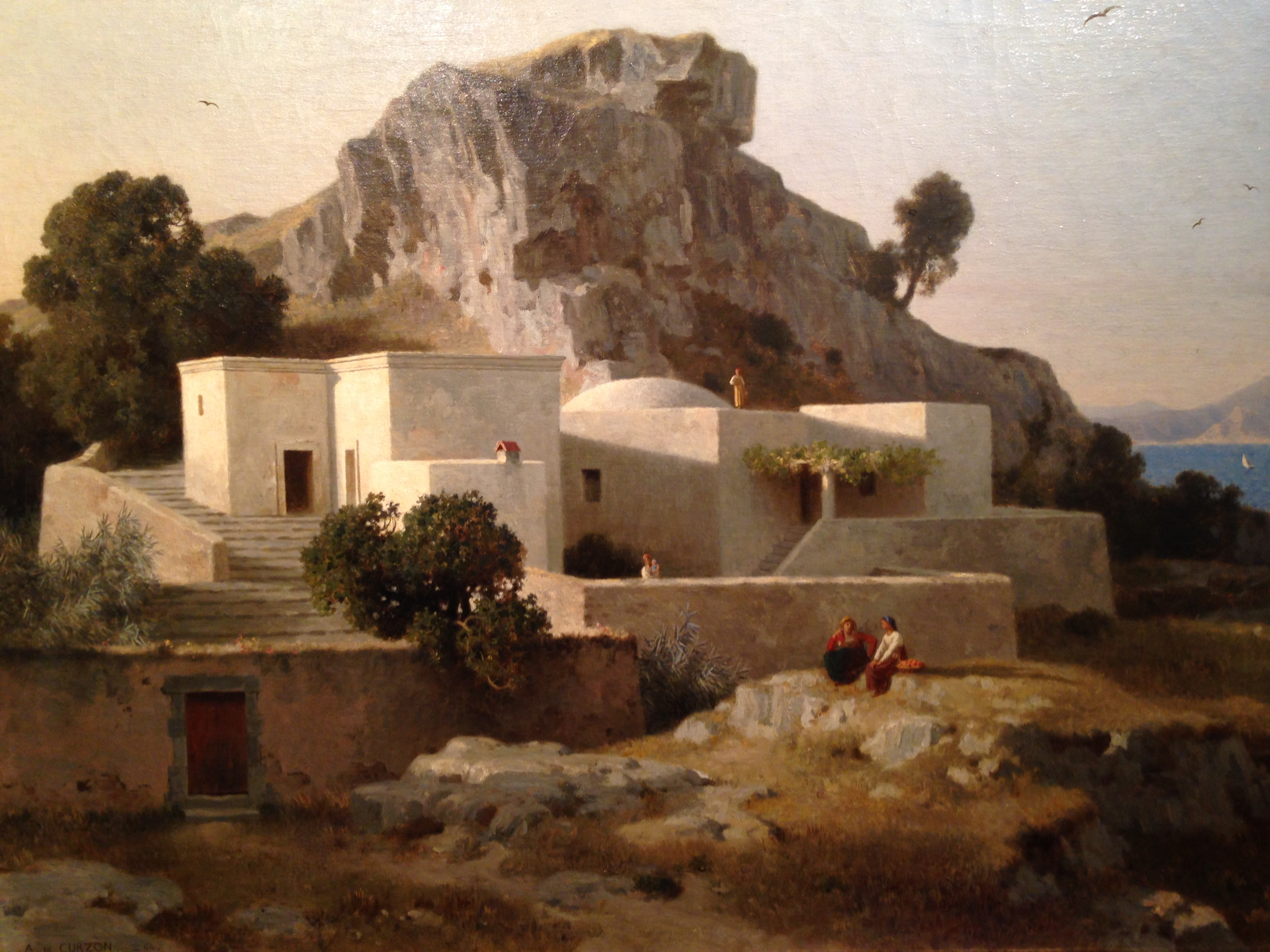 Vue de Sorrente